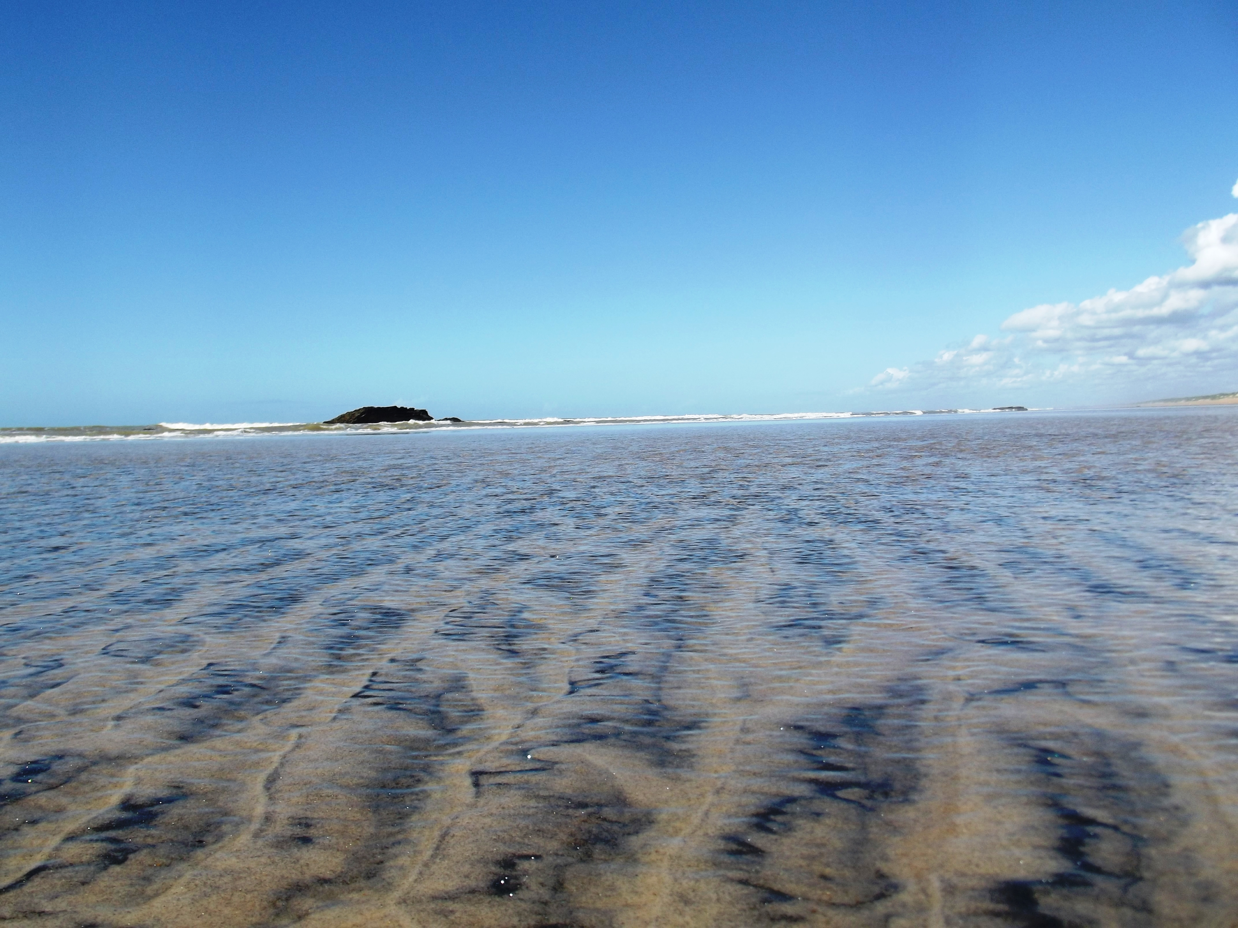 Insira_uma_descrição_para_sua_foto